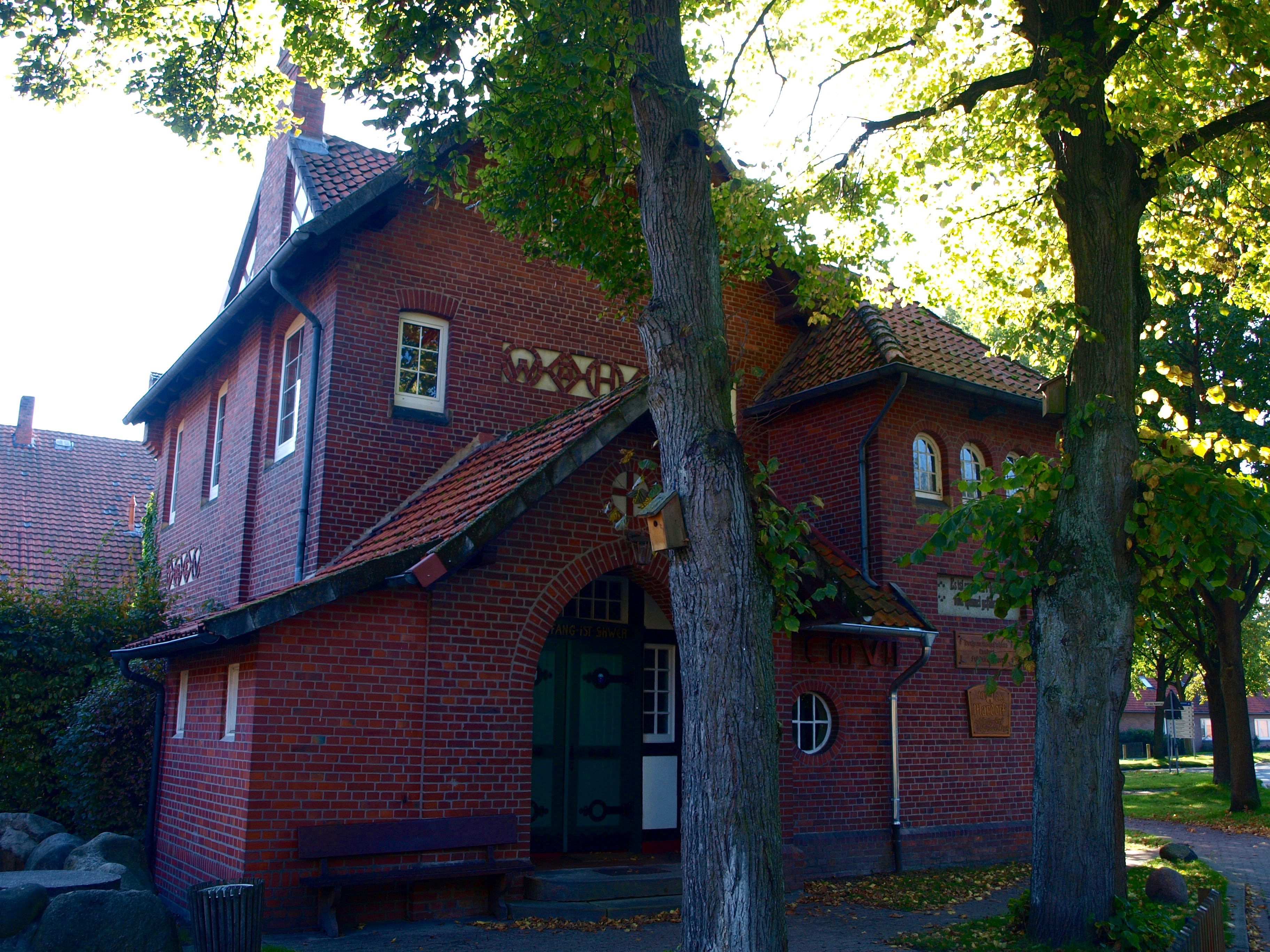 Mardorfer Str. 4